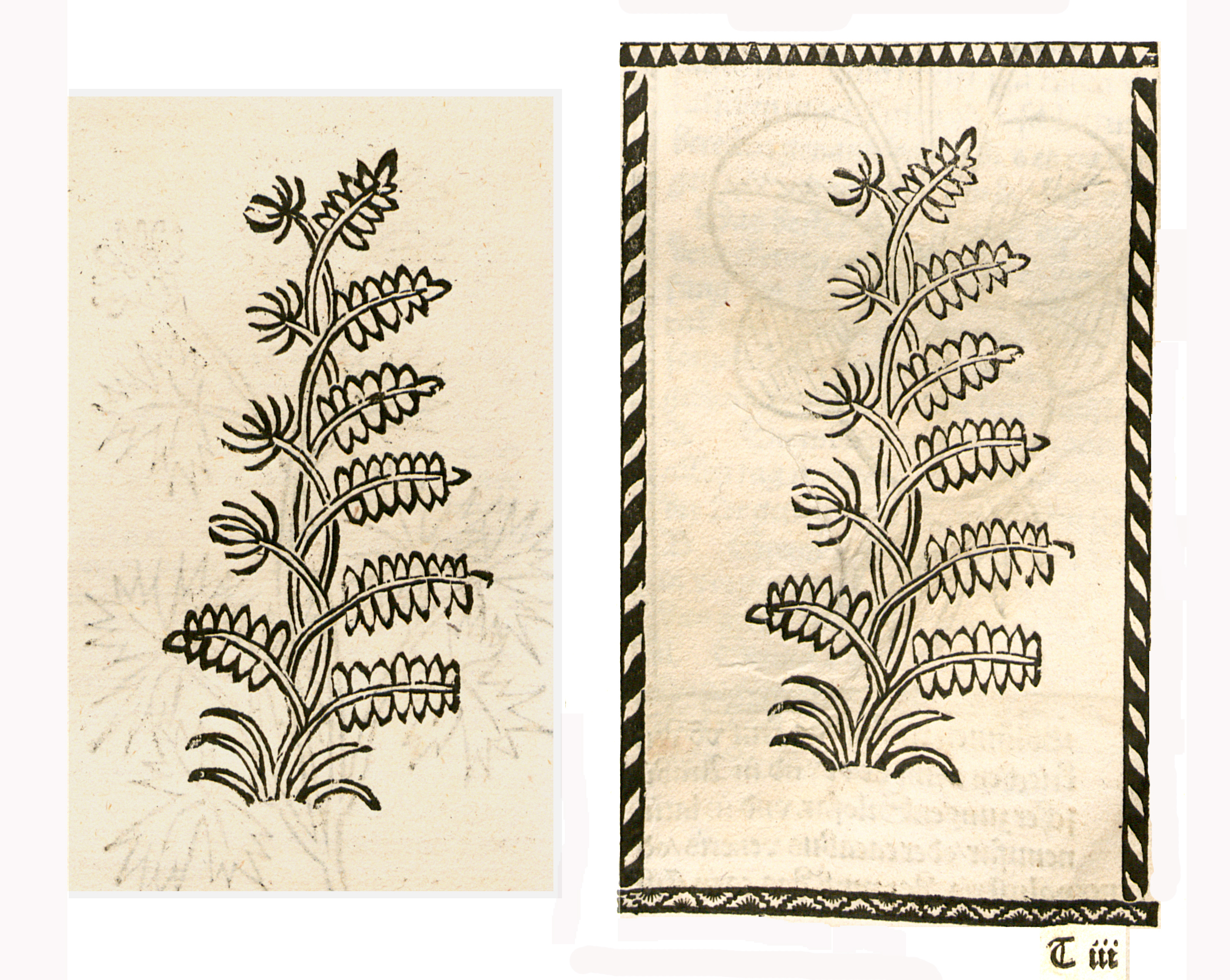 Abbildung vonː Sant Cristofferus Krut (Osmunda regalis)